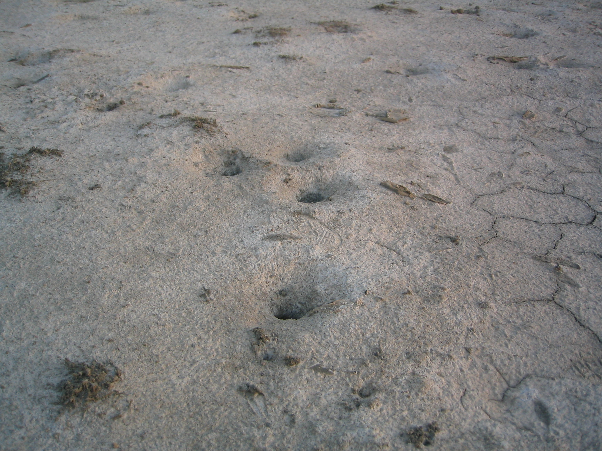 Gros plan sur le sol aride d'un tanne (étendue de terre salée) dans le Siné-Saloum (Sénégal). On remarque quelques empreintes humaines et animales.